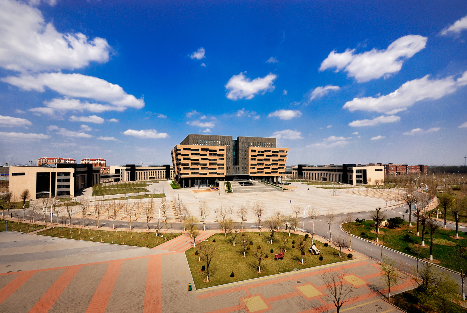 北校园综合楼